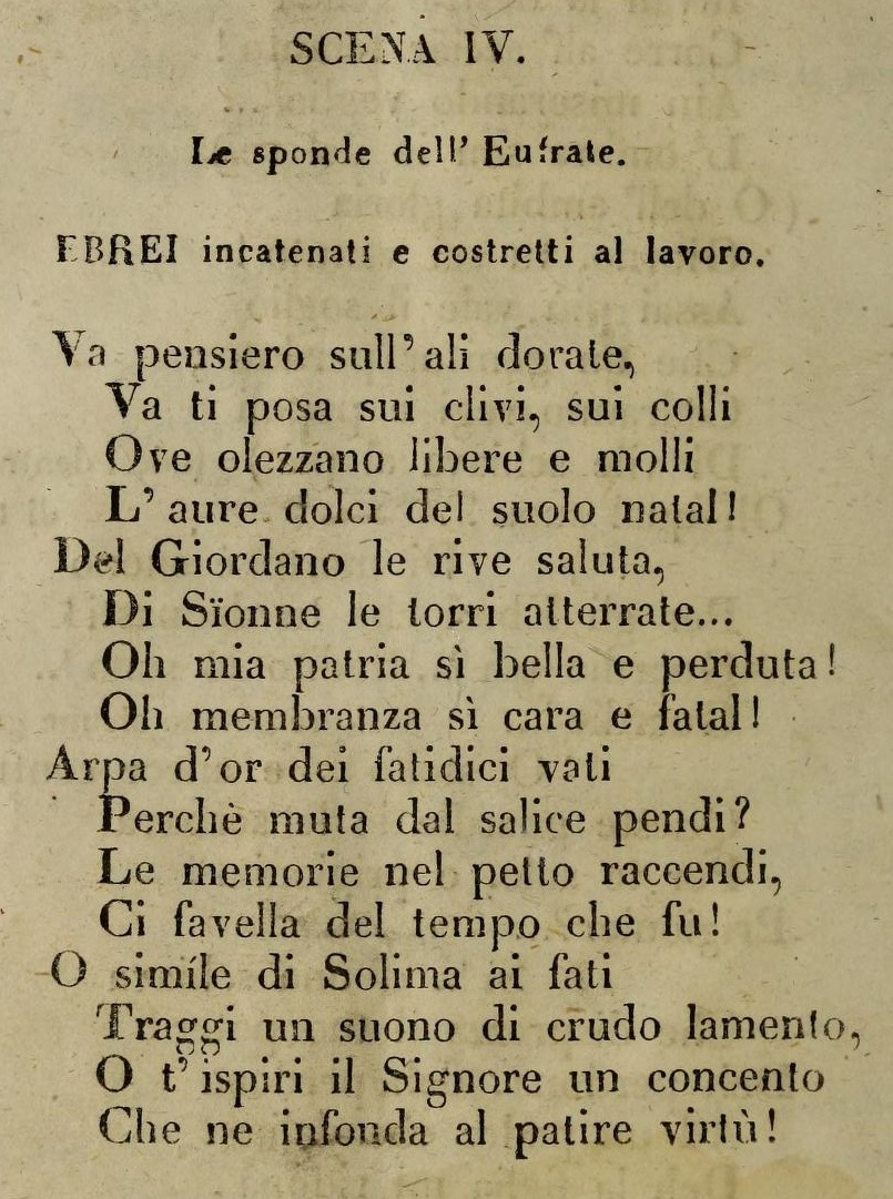 Va, pensiero im Originaldruck des Opernlibrettos Nabucodonosor von Temistocle Solera, Mailand 1842